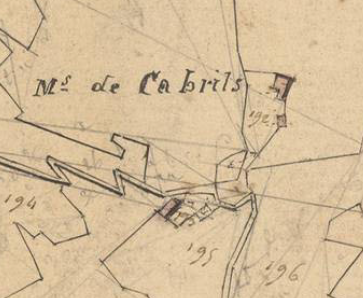 Cabrils en el Cadastre napoleònic del 1812 (Arxius Departamentals dels Pirineus Orientals)